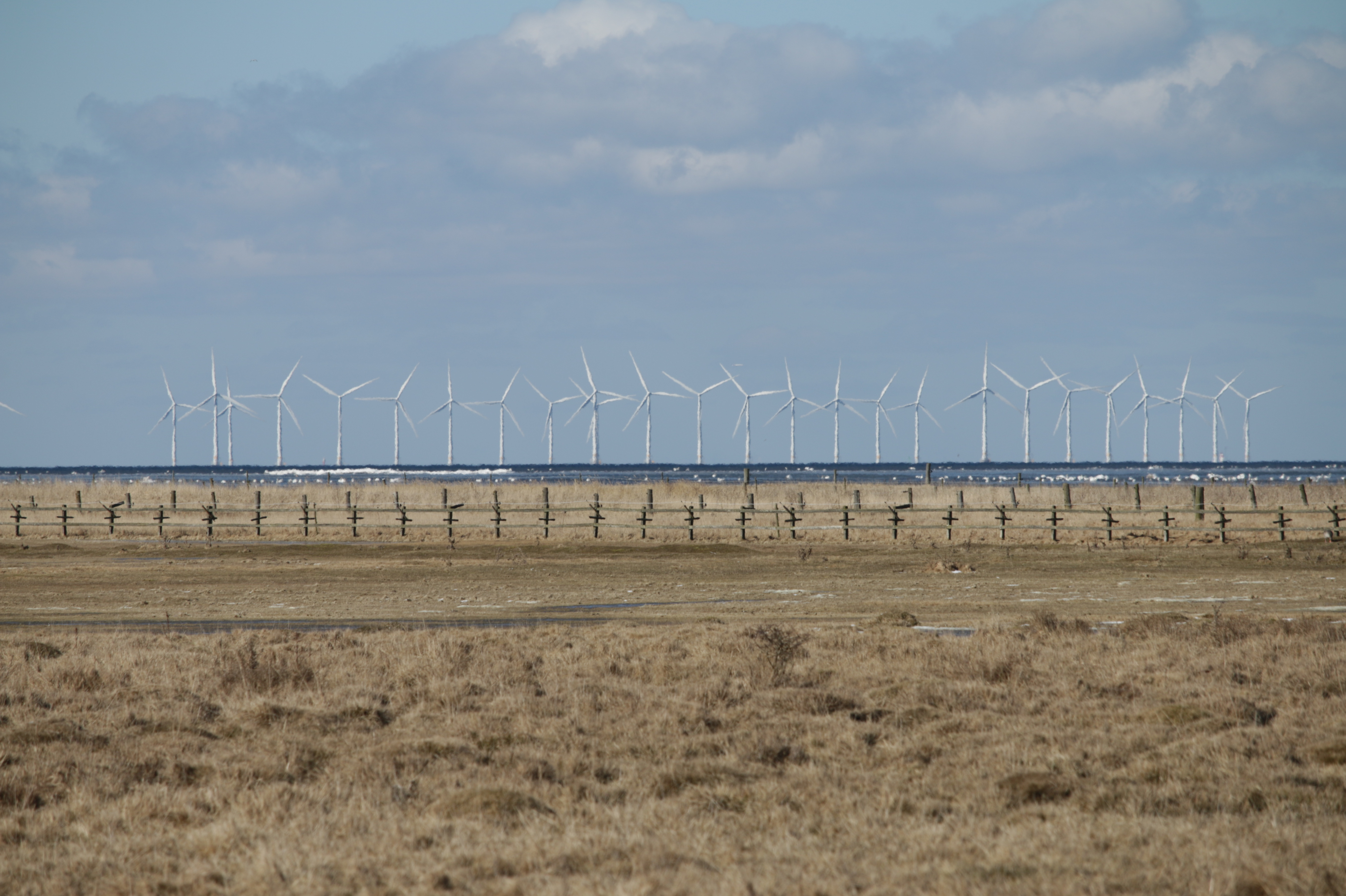 Eskilstorps ängar och vindkraftverk